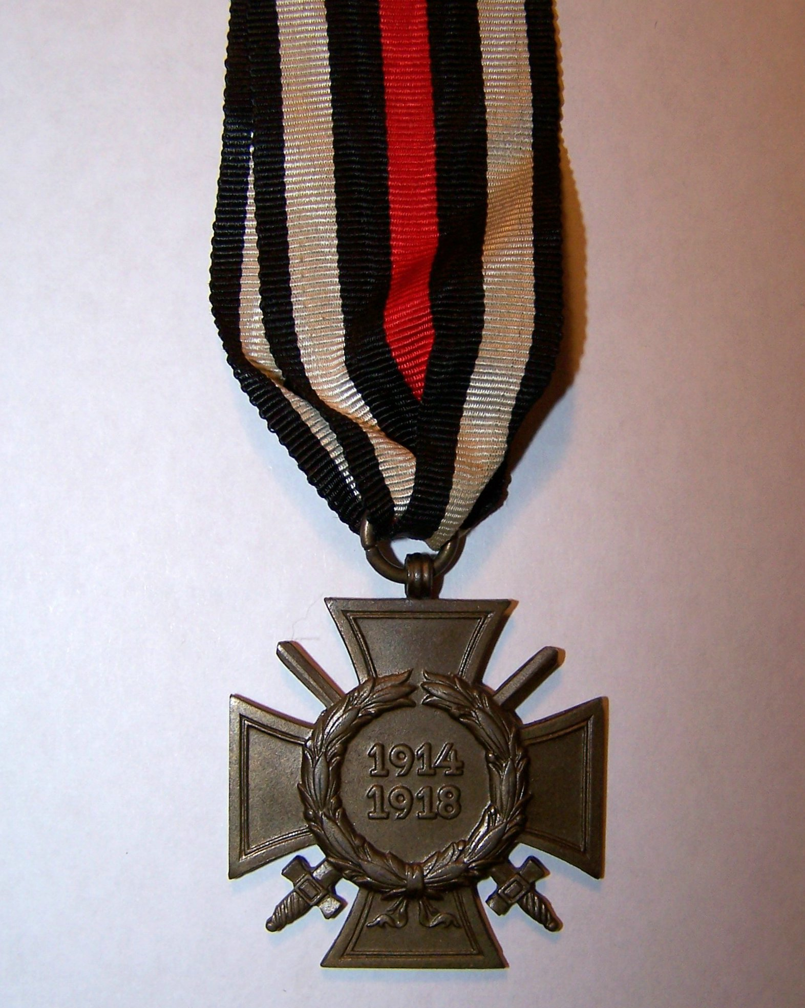 Militärische Auszeichnung Deutschland 1934 Ehrenkreuz des Weltkrieges 1914/1918, in drei Klassen, hier: Ehrenkreuz für Frontkämpfer – mit Schwertern.